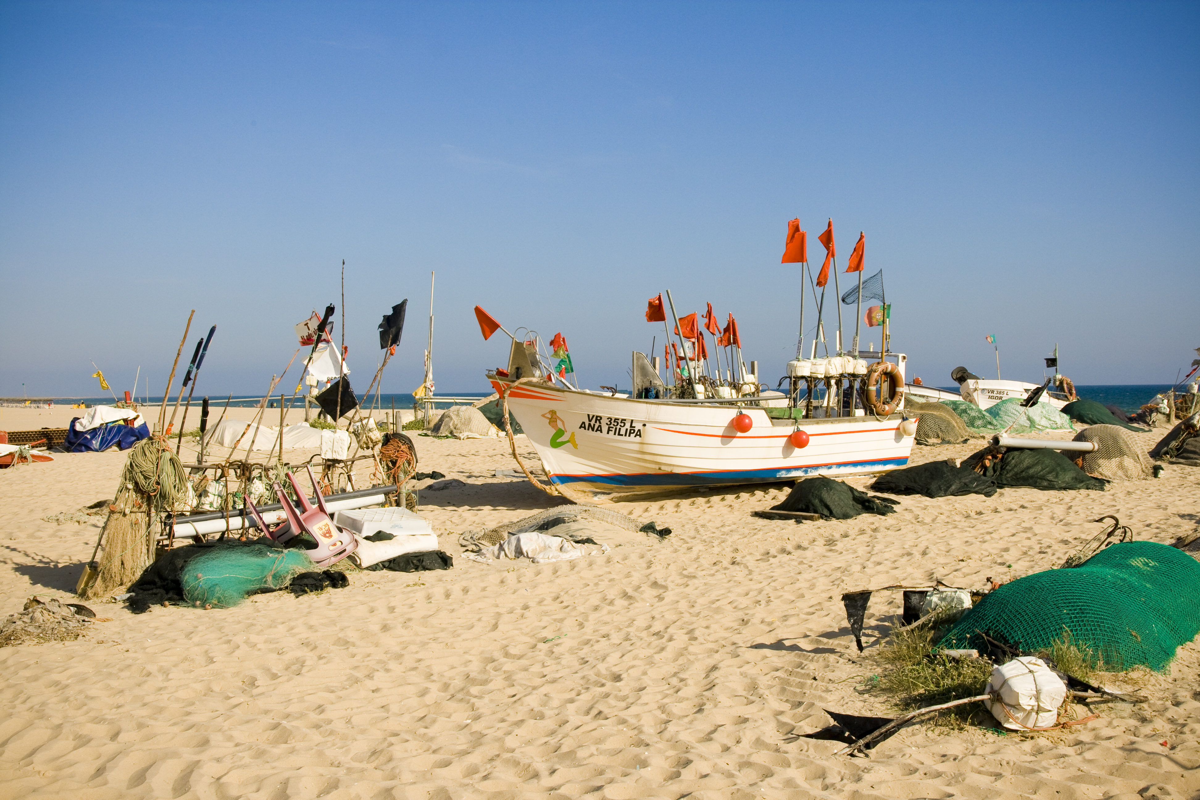 Monte Gordo beach